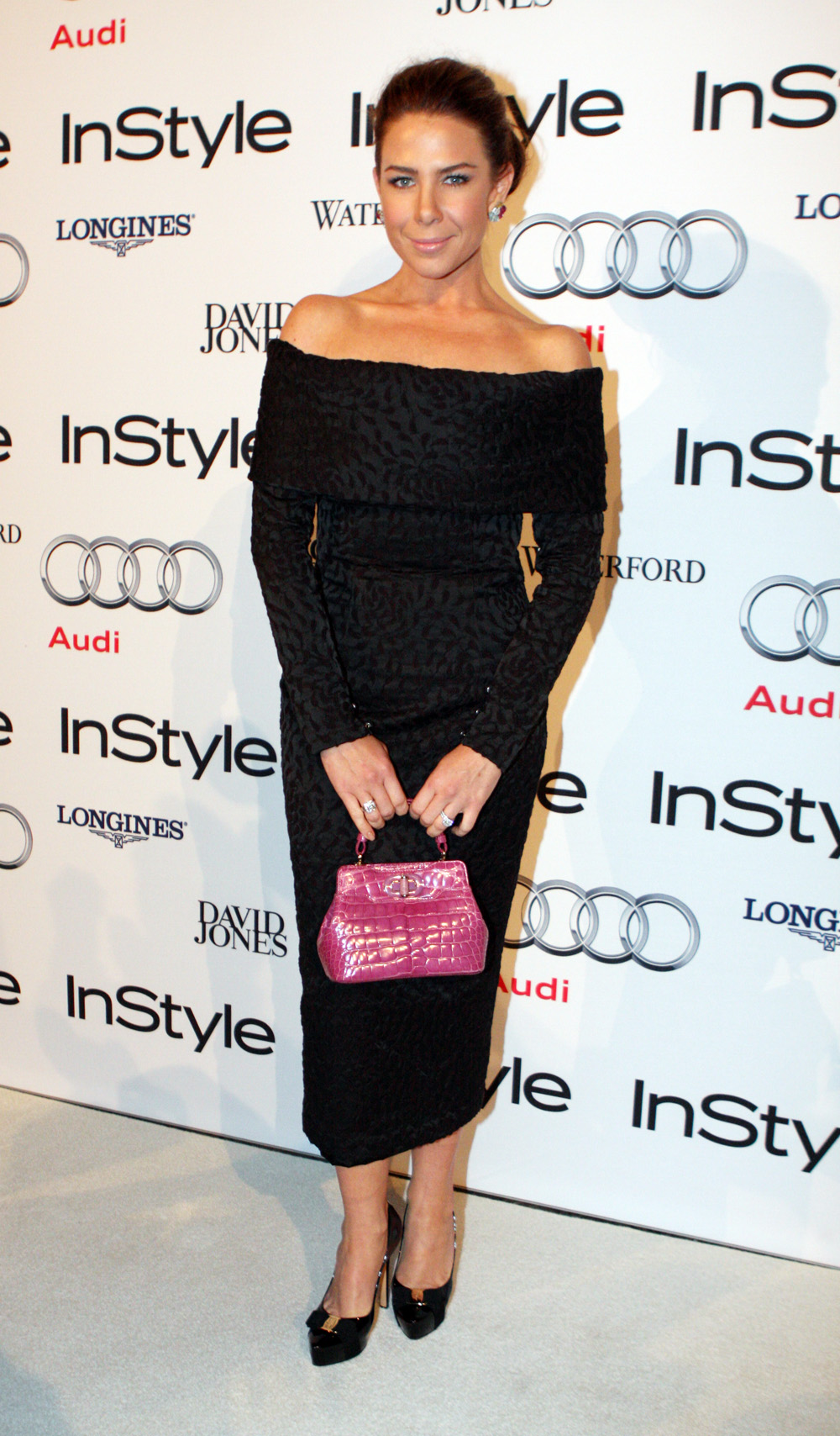 Kate Ritchie